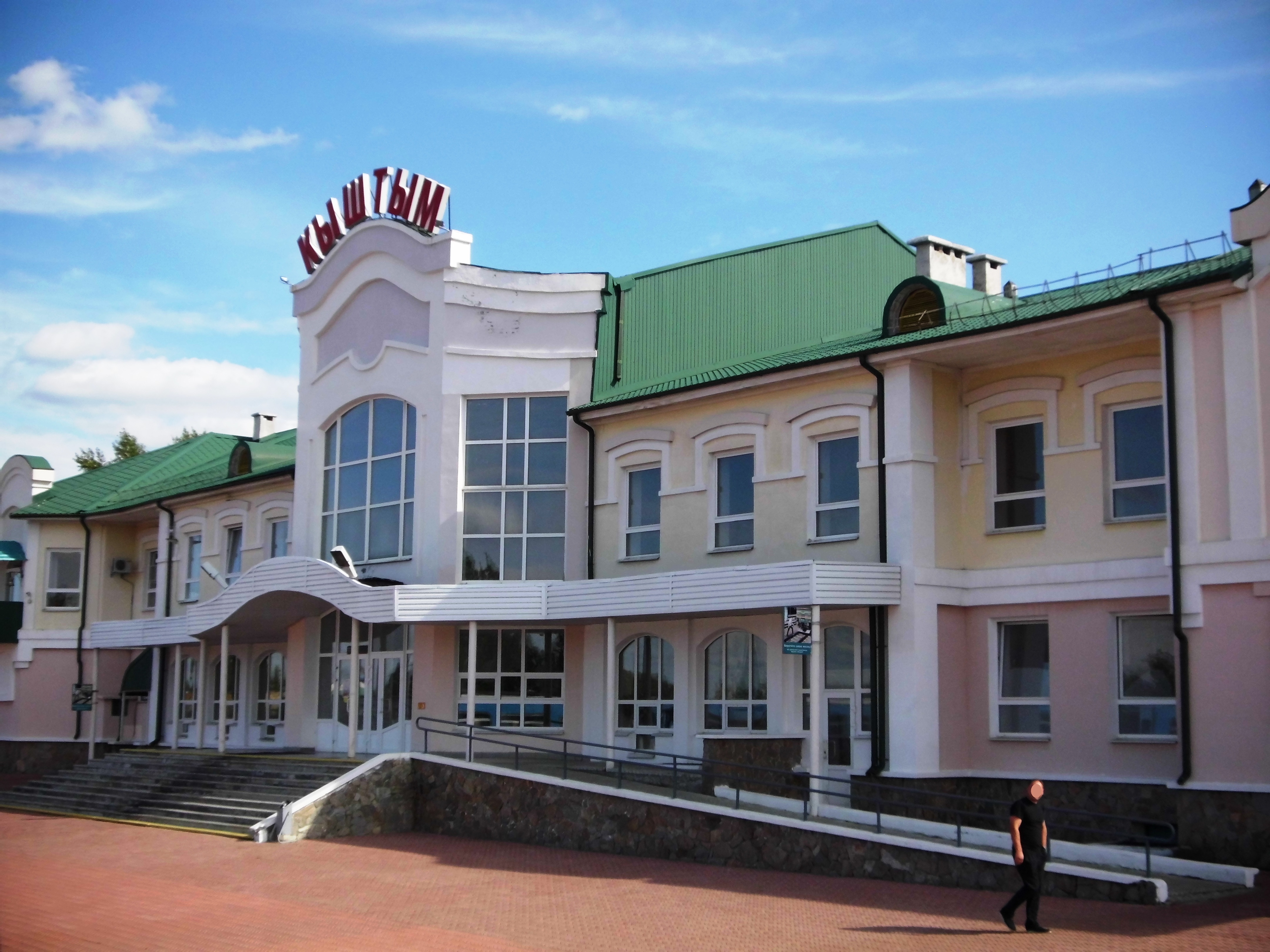 Россия, Челябинская область, г. Кыштым. Здание вокзала железнодорожной станции Кыштым ЮУЖД.